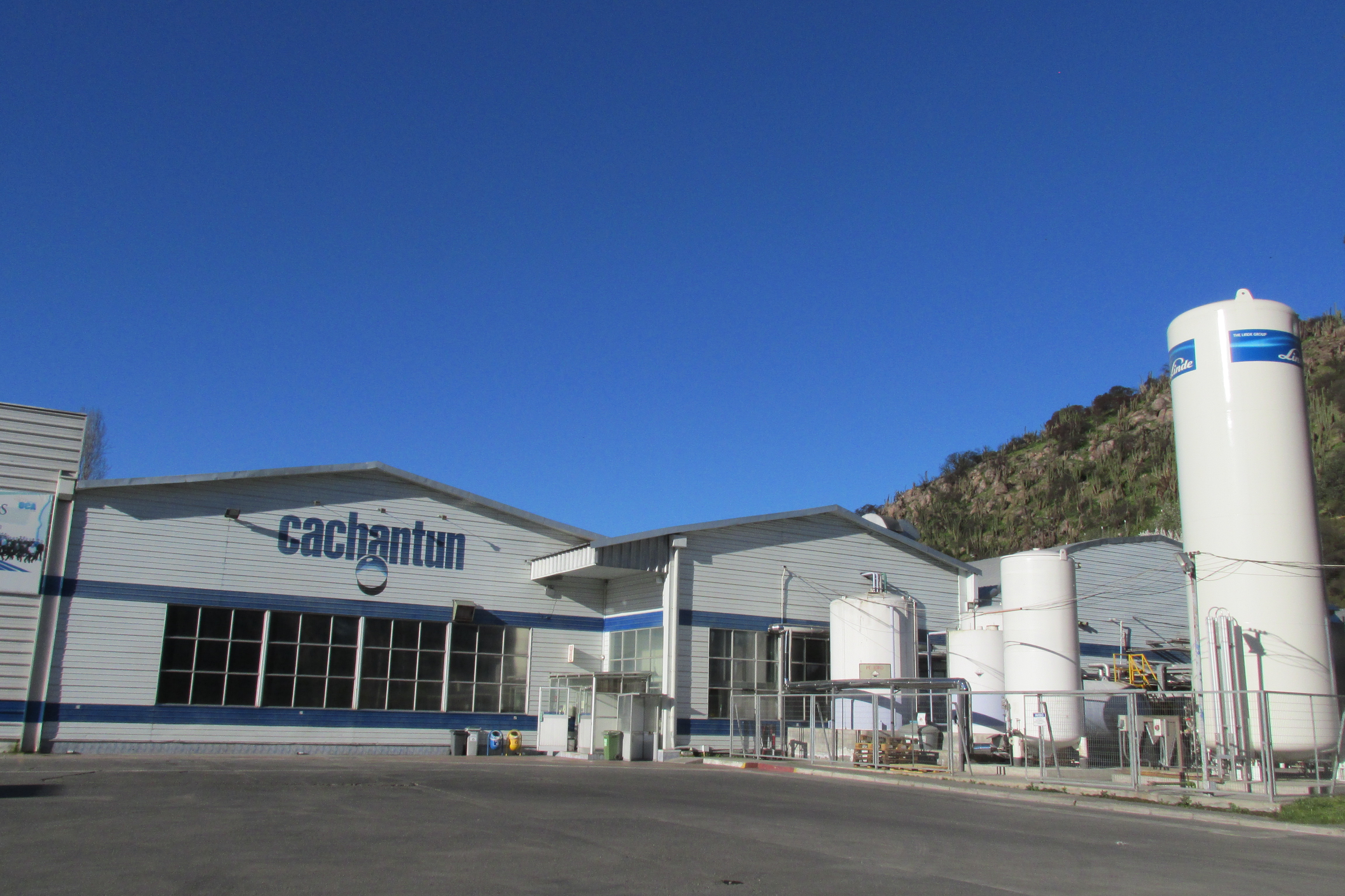 Interior Planta Agua Mineral Cachatún, sector Copequén comuna de Coinco